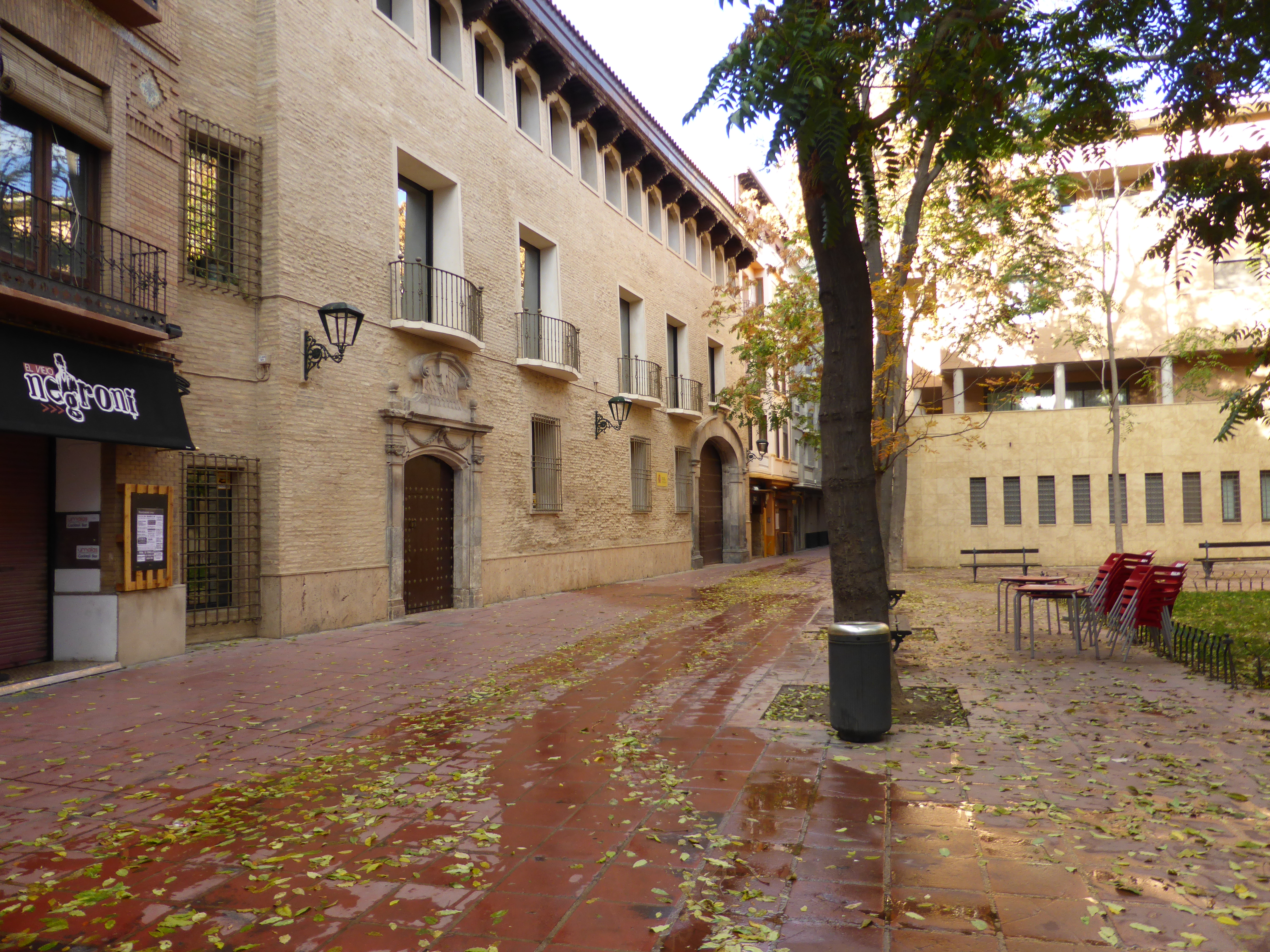 Hojas caídas en otoño, en la plaza de Santa Cruz, del casco antiguo de Zaragoza (Aragón, España).